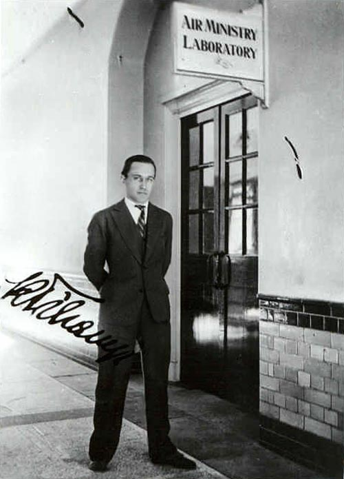 Tihanyi Kálmán (Brit Légügyi Minisztérium bejáratánál)